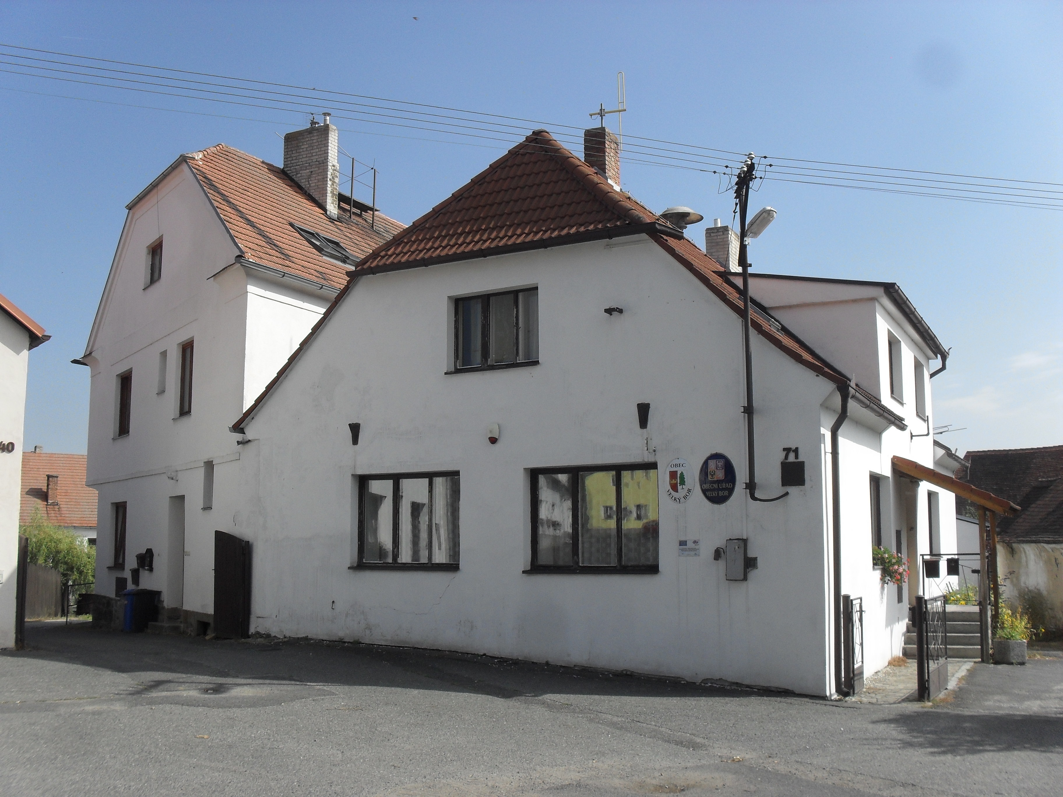 Fotografie pořízena v obci Velký Bor.